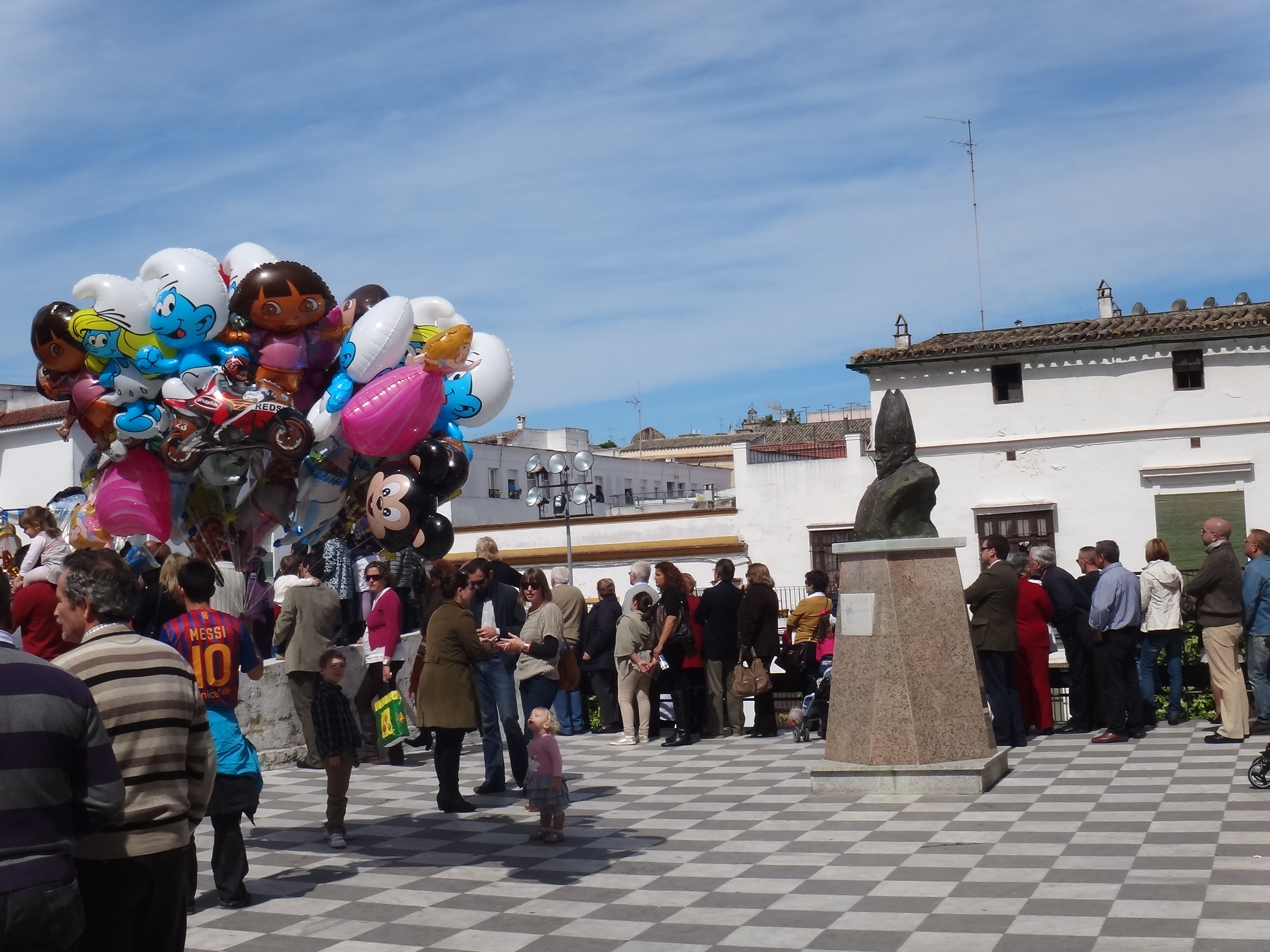 Monumento al Cardenal Bueno Monreal en Jerez de la Frontera (Andalucía, España)